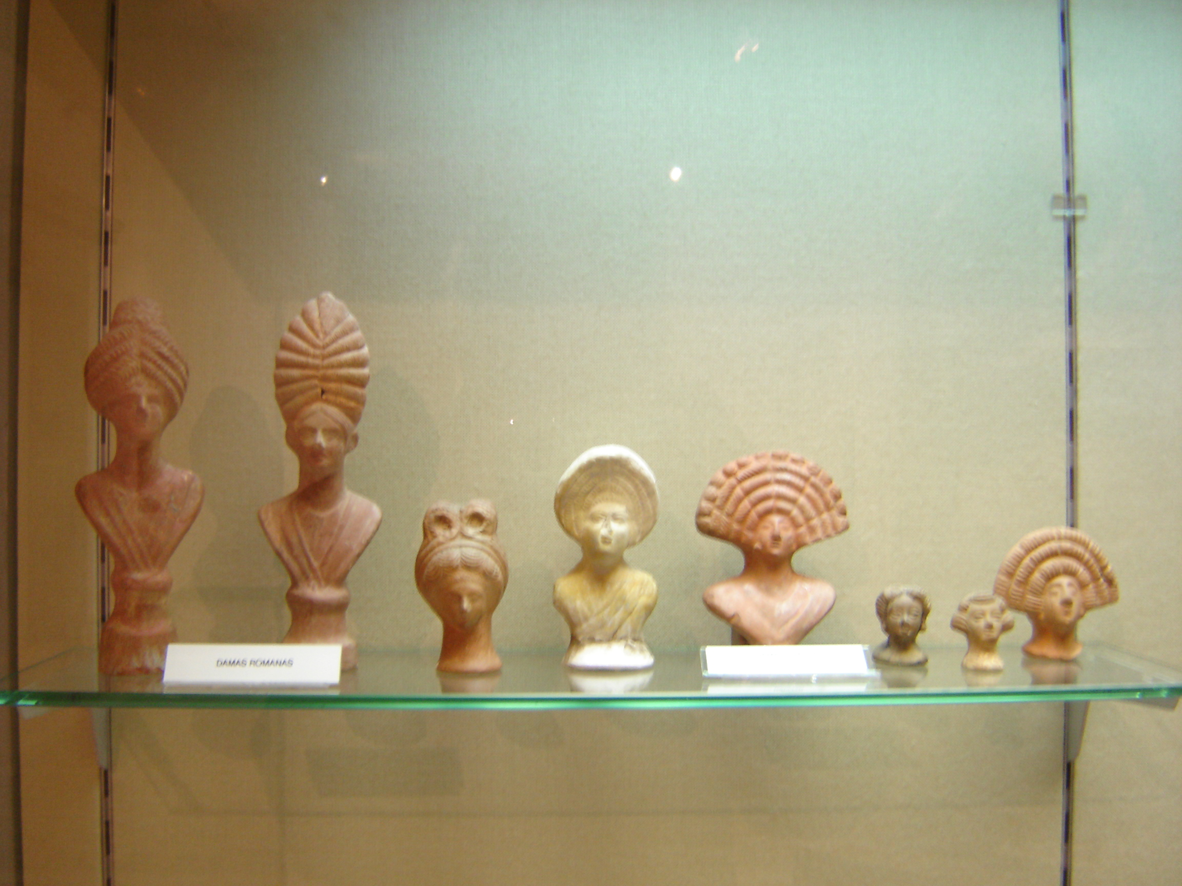 Museo Arqueológico (Plaza de América), en el Parque de María Luisa (Sevilla). Terracotas romanas mostrando los tocados de las mujeres. Realización propia.